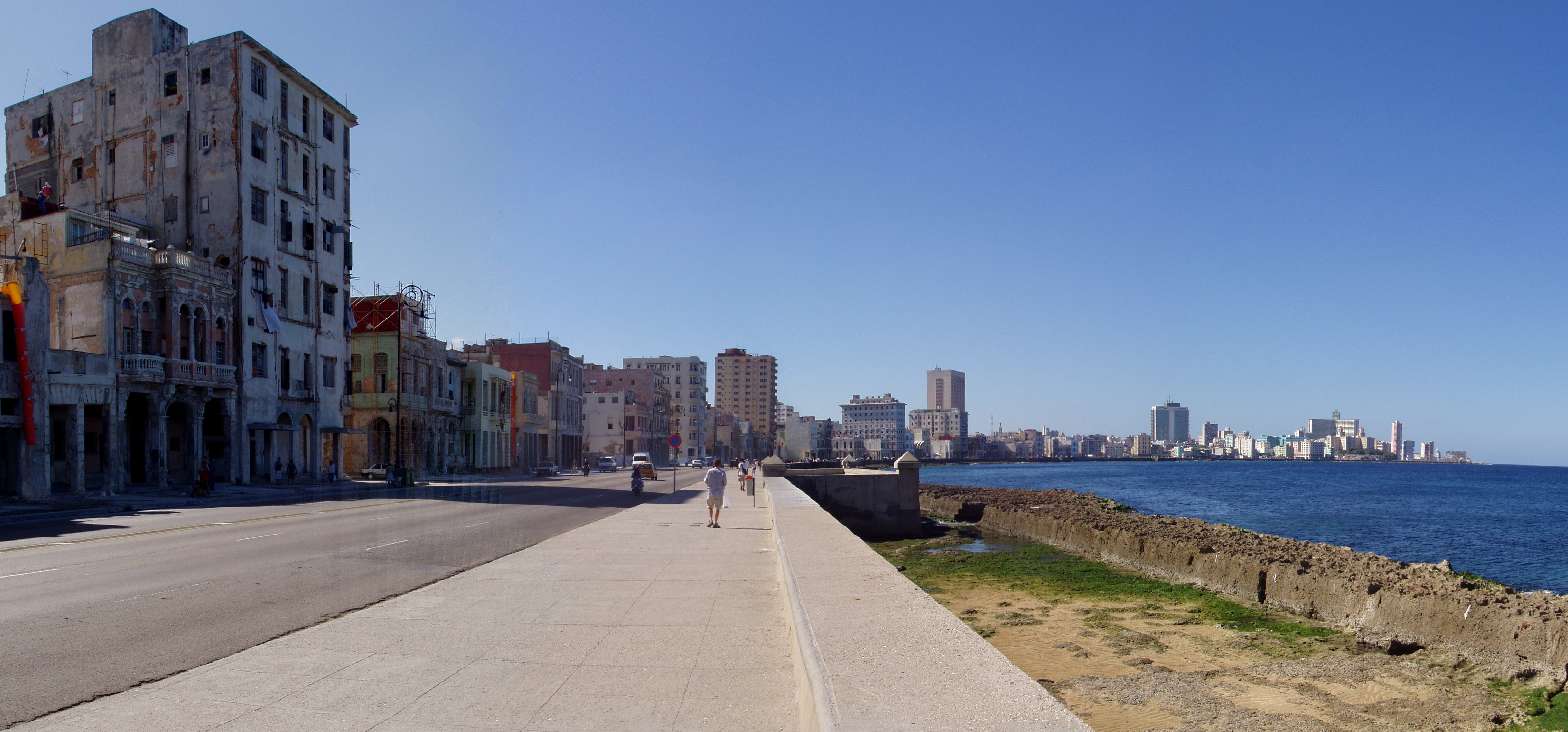 Der Malecón in Havanna, Blick nach Westen.